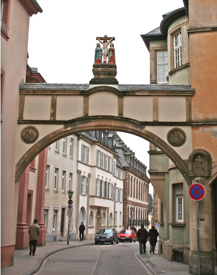 Südentrée vun der Doumstad zu Tréier (Januar 2006)